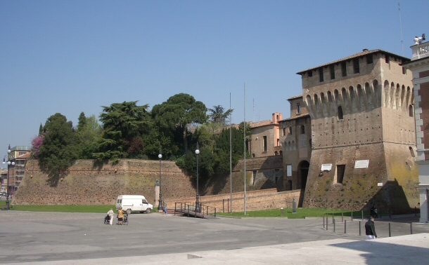 Lugo (Ravenna): la Rocca Estense